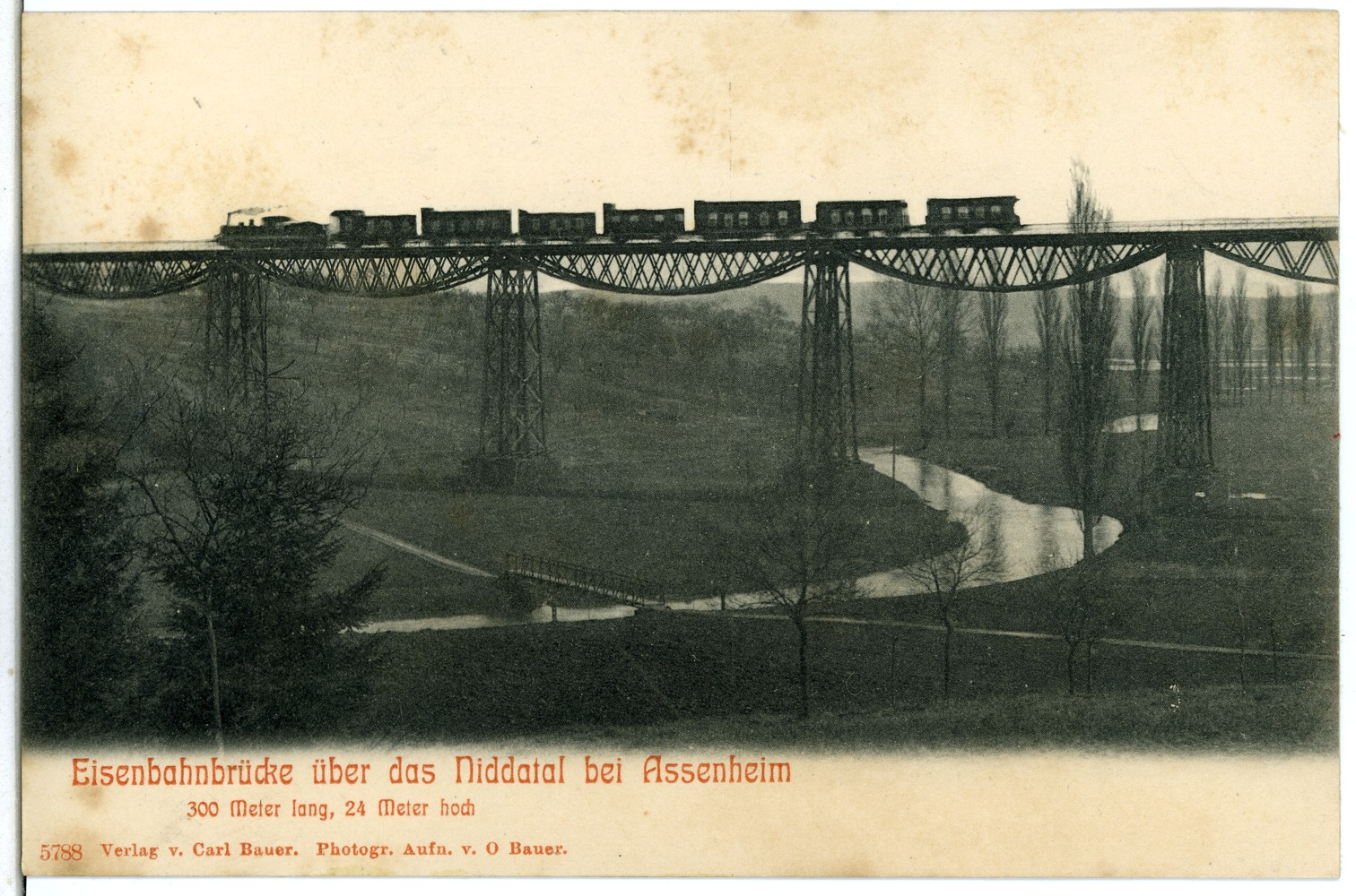 Assenheim; Assenheimer Brücke mit Eisenbahnzug Diese Ansichtskarte stammt vom Kunstverlag Brück & Sohn aus Meißen ( Die Karte hat die eindeutige Nummer 05788 und ist in höherer Auflösung beim Verlag erhältlich. Sie wurde im Rahmen einer Kooperation zwischen Wikipedianern und dem Kunstverlag für Wikimedia Commons zur Verfügung gestellt.